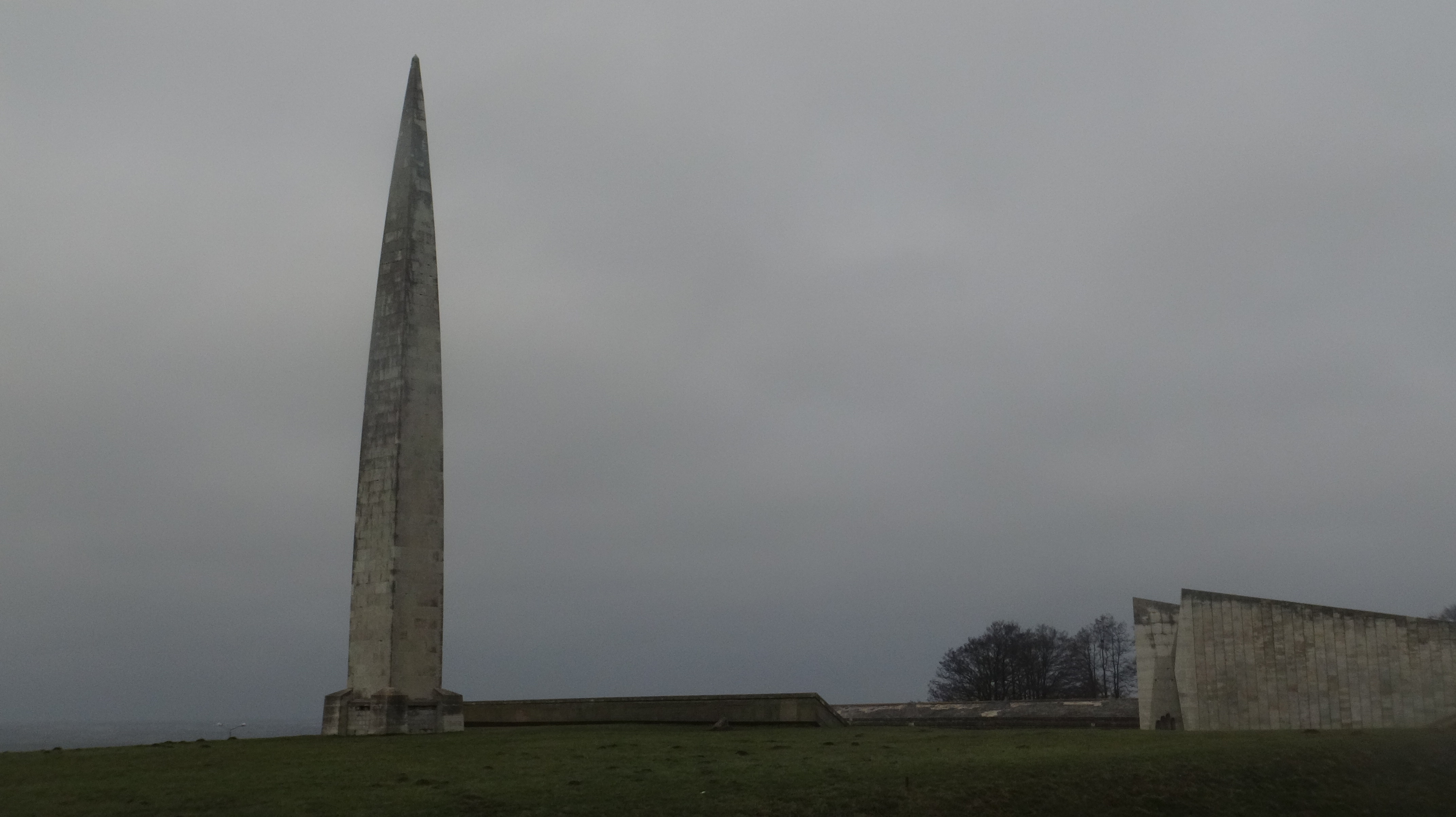 Обелиск Мемориального комплекса Маарьямяги